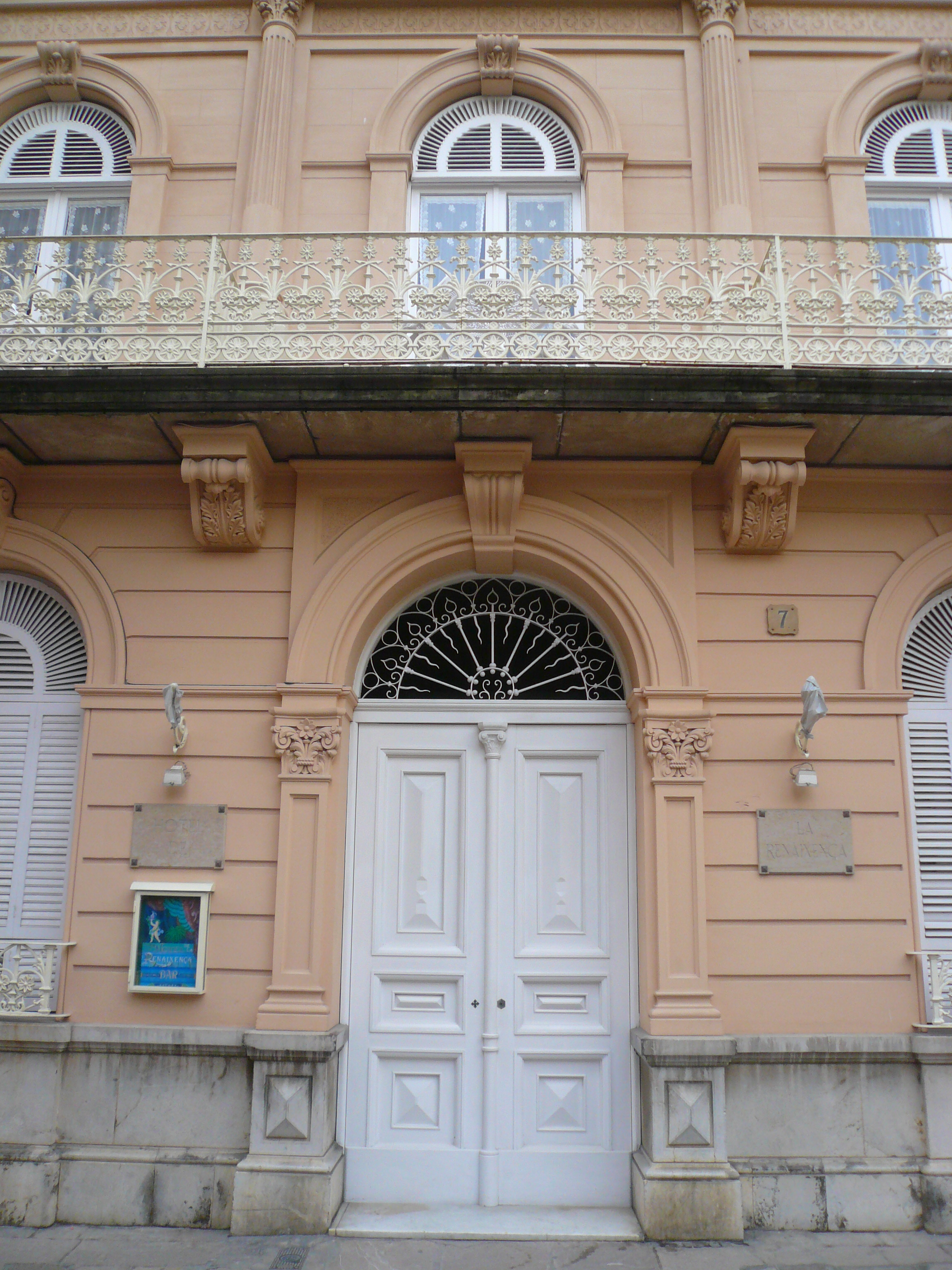 Can Robert (Sitges) Object location41° 14′ 06.49″ N, 1° 48′ 33.33″ E